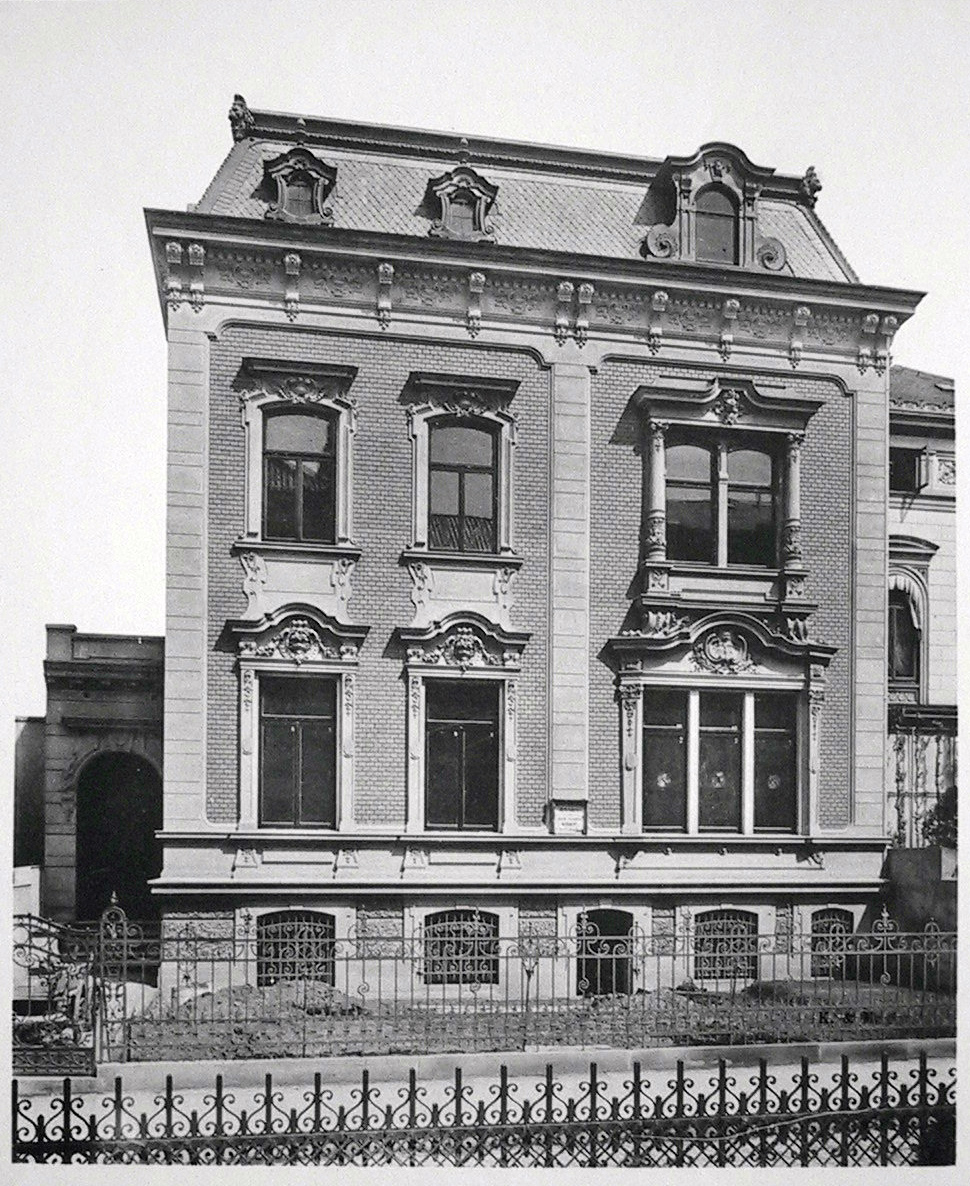 Haus Oelrichs, Kohlhökerstraße 34 in Bremen-Ostertor